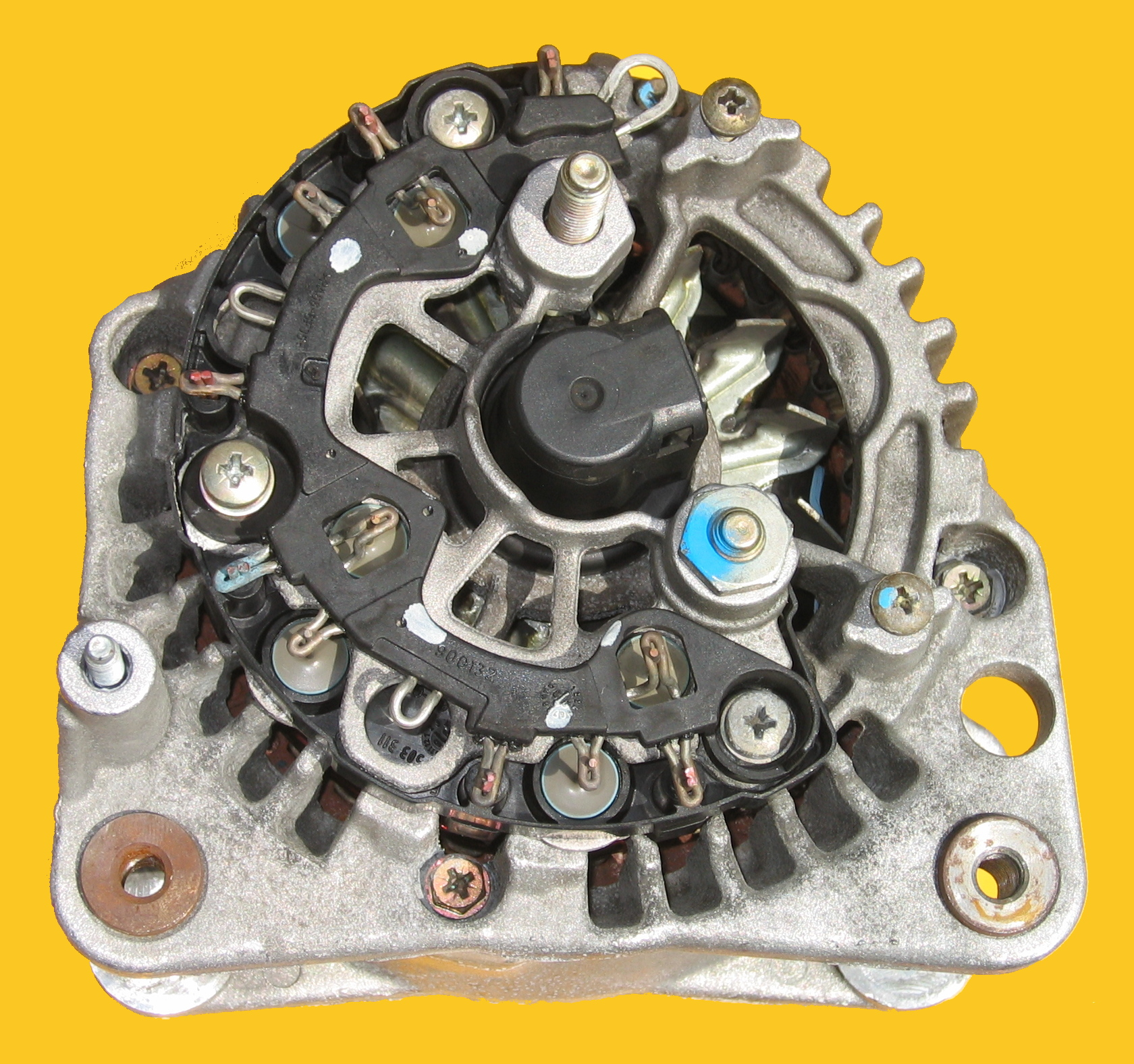 Gleichrichter in einer Lichtmaschine mit abgenommenem Regler